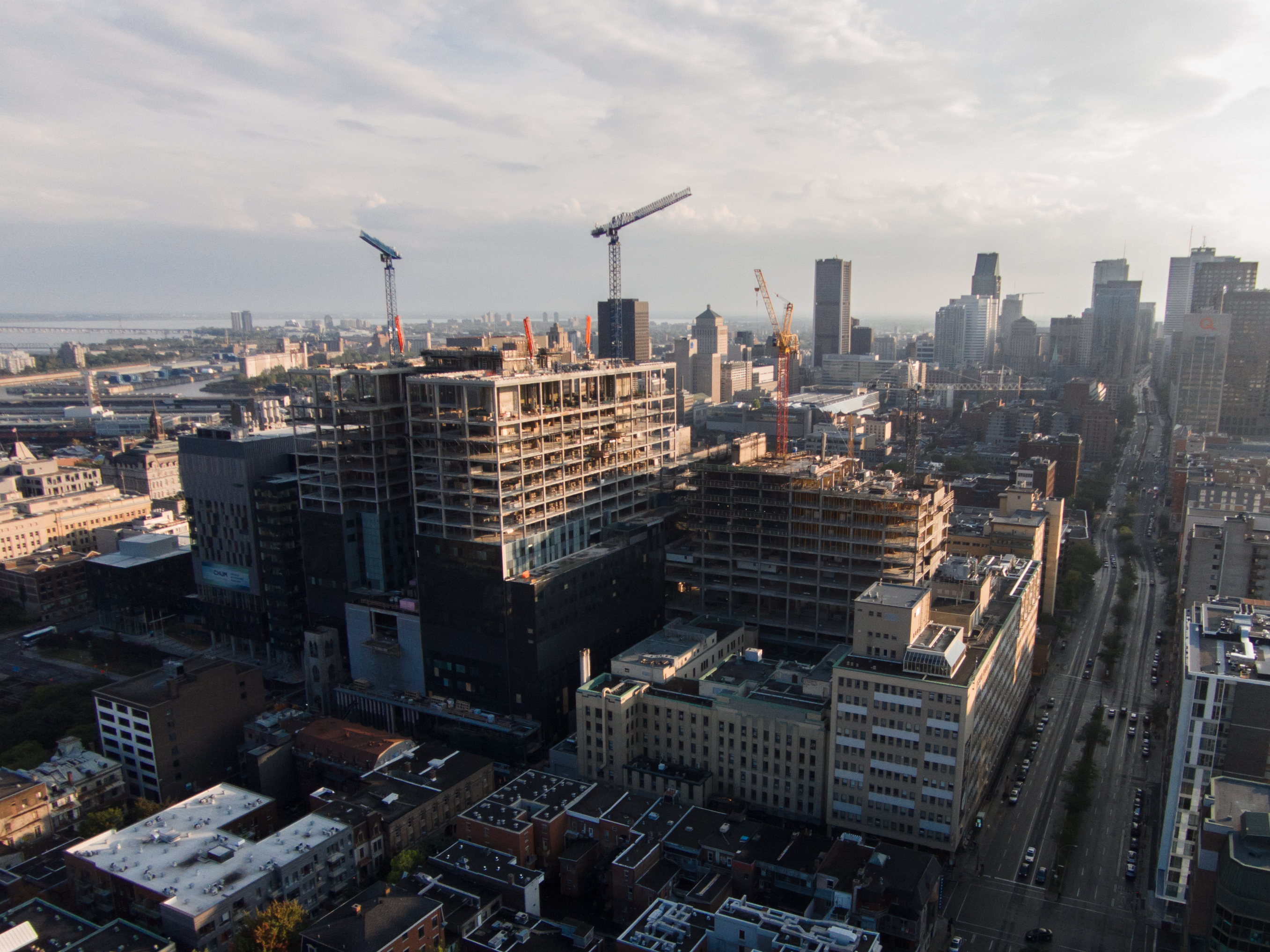 Le Centre hospitalier de l'Université de Montréal en construction en 2014.